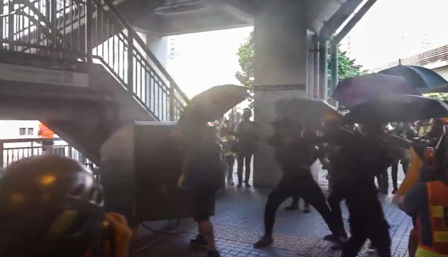 921屯門遊行，示威者在地面輕鐵站範圍